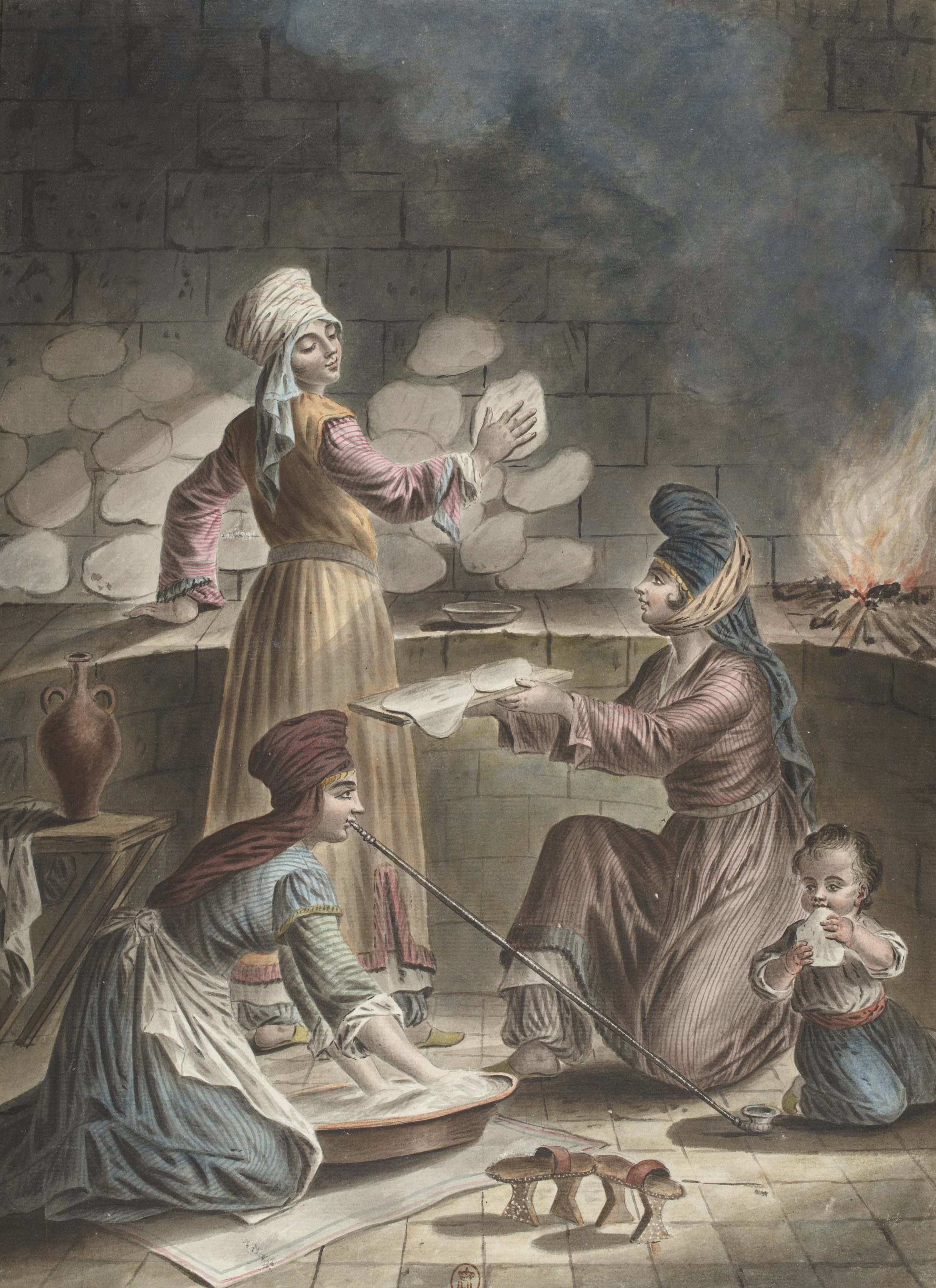 Femmes Turcs turques de Serquin, leur manière de faire leur pain - Syrie